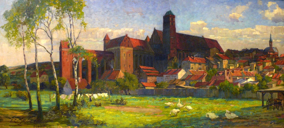 Blick auf den Dom und die Burg in Marienwerder. Öl auf Holz, 51 x 114 cm, Westpreußisches Landesmuseum